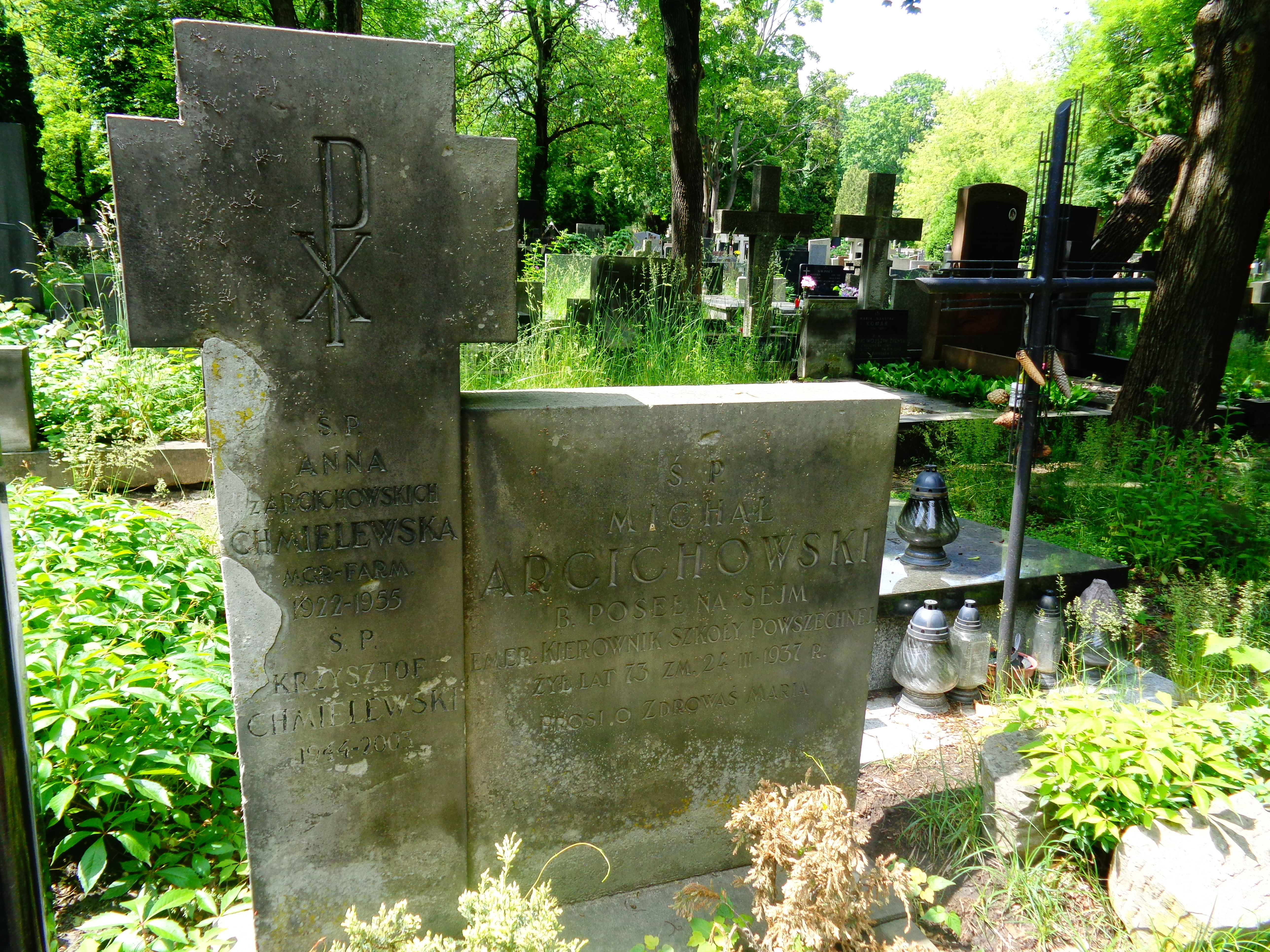 Grób Michała Arcichowskiego na Cmentarzu Powązkowskim